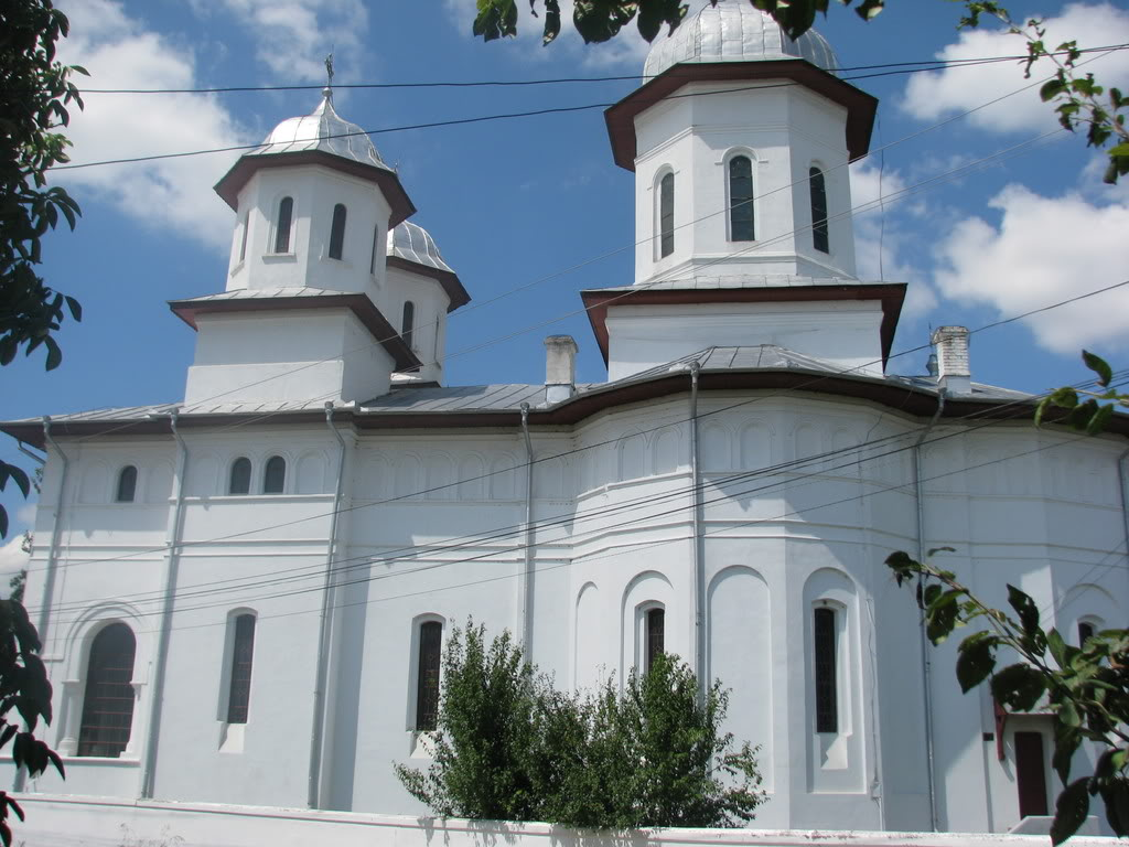 Biserica Varasti, Giurgiu, Romania